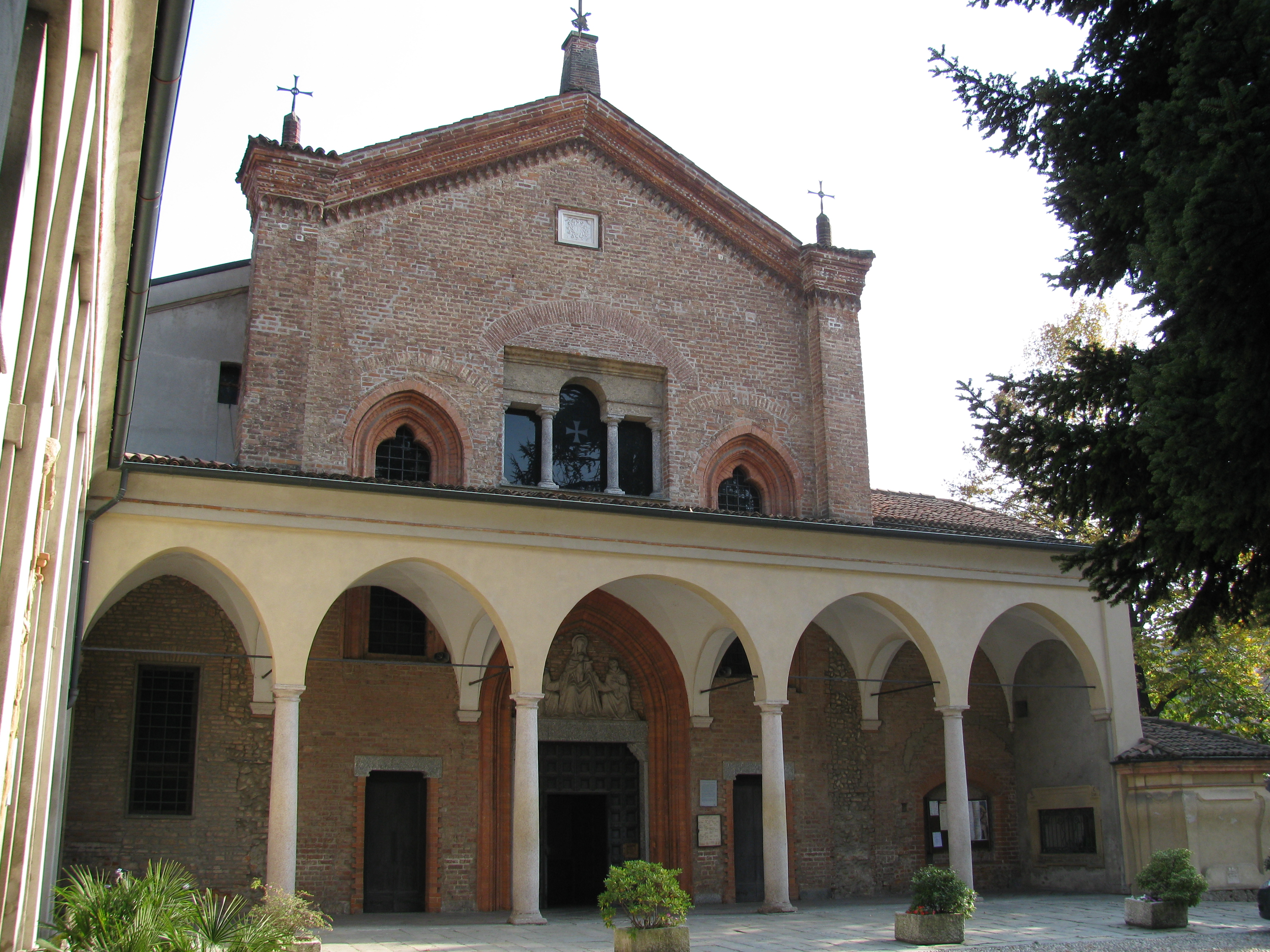 Facciata della Chiesa di Santa Maria delle Grazie (Monza - Milano)